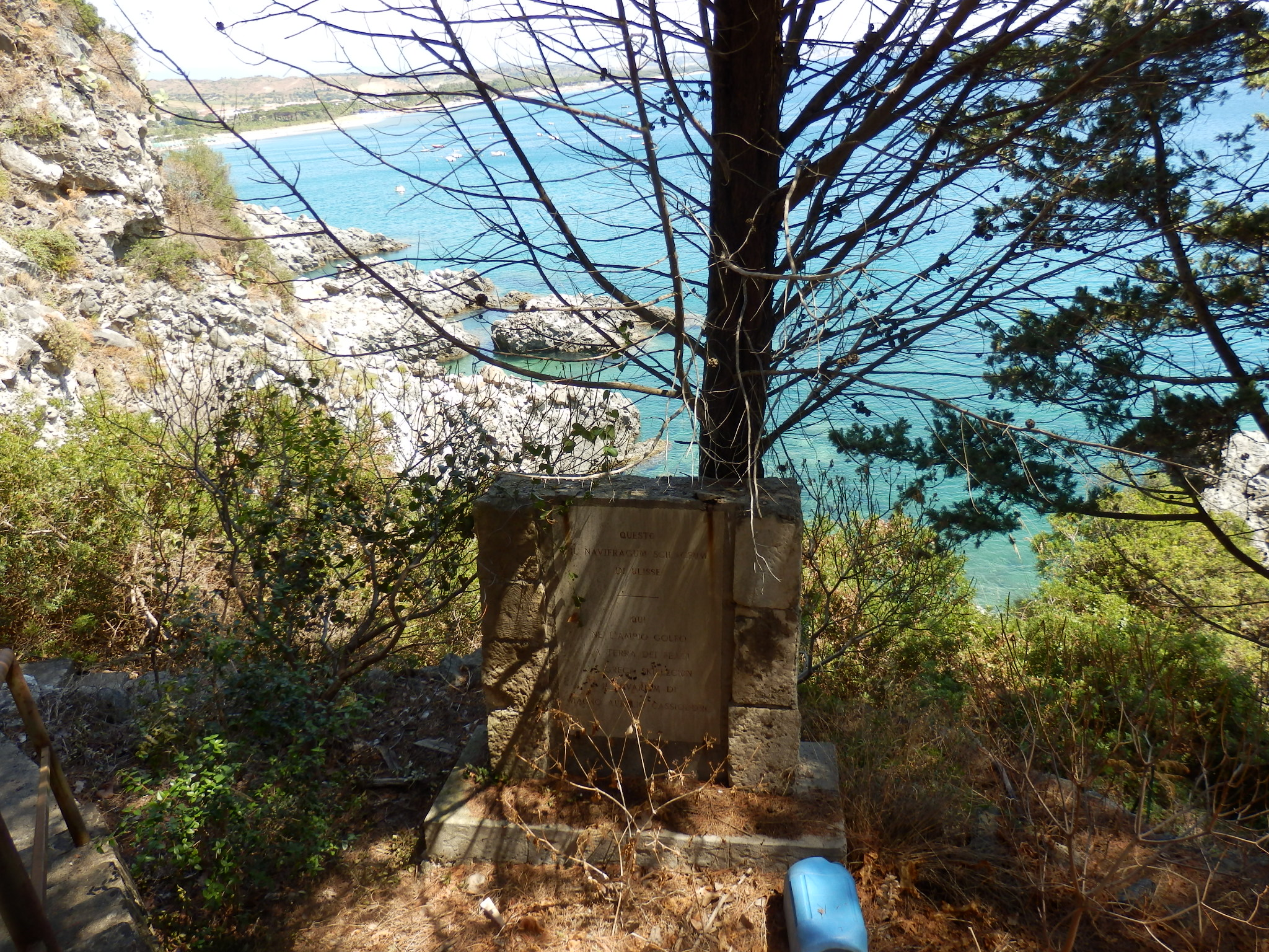 Stele a Ulysse, au Pheaciens et a Cassiodore